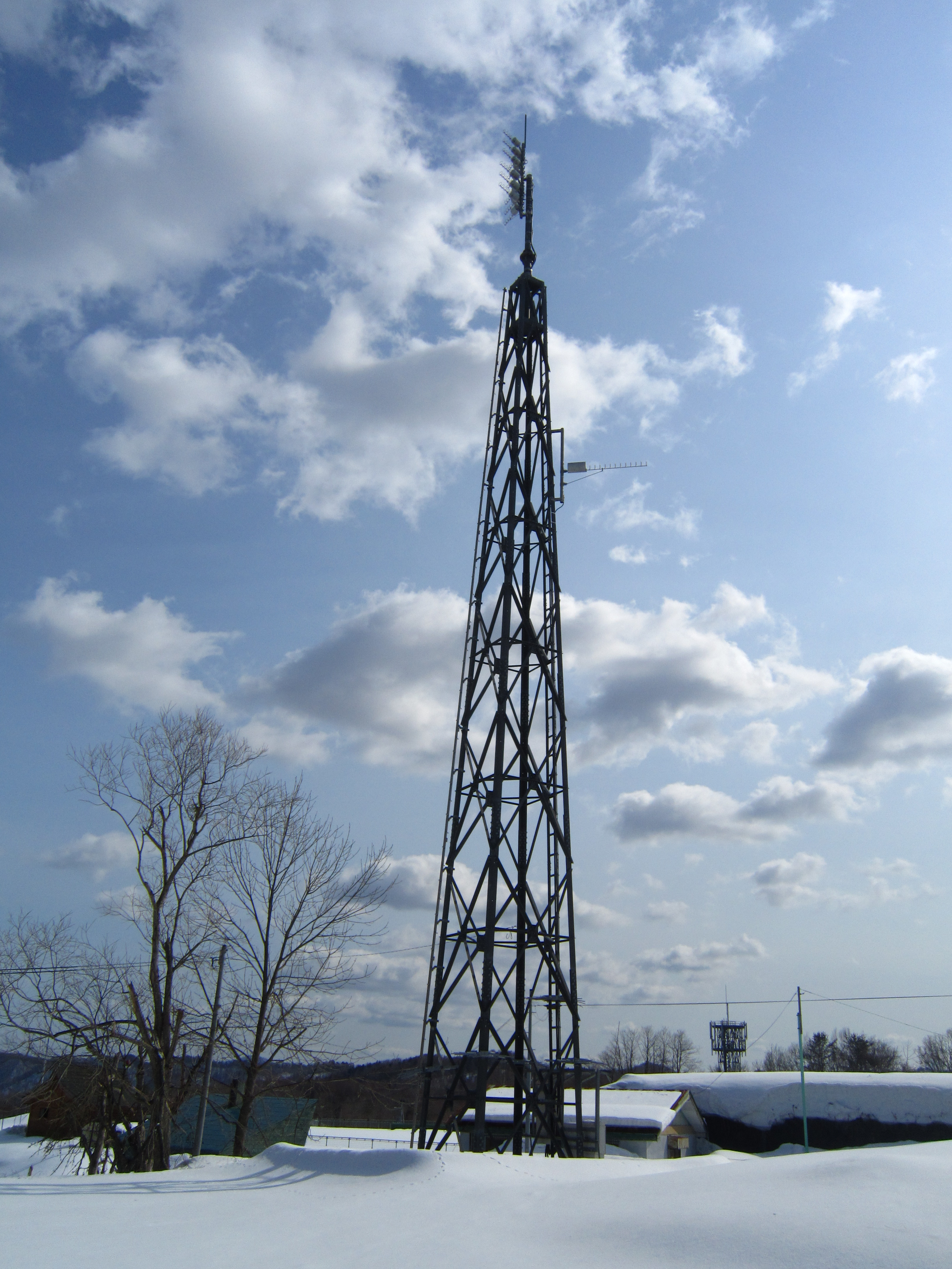 夕張新千代田中継局